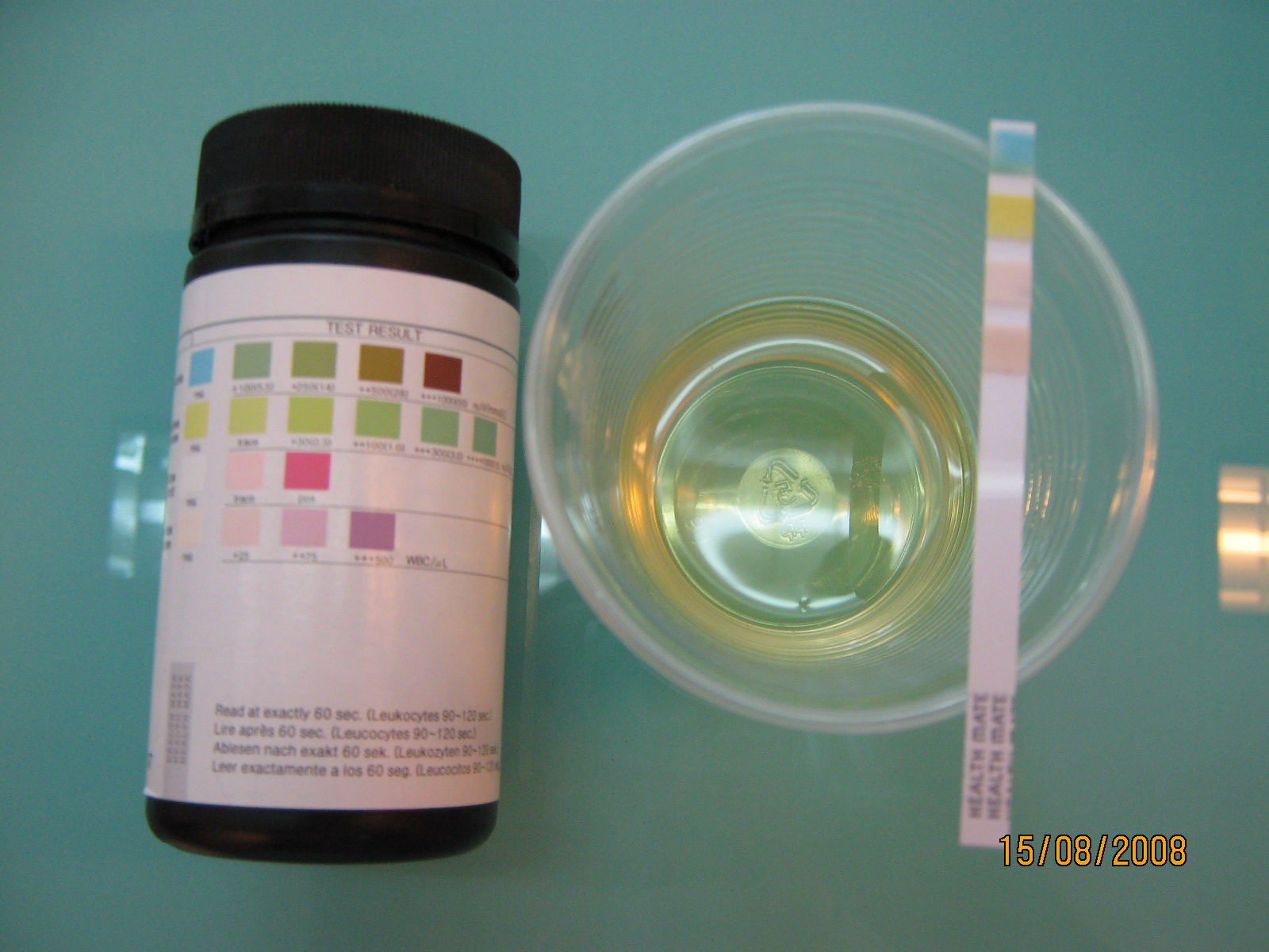 Bandelette urinaire (du haut vers le bas : glucose, protéine,nitrite et leucocytes) , pot à urine et échelle colorimétrique